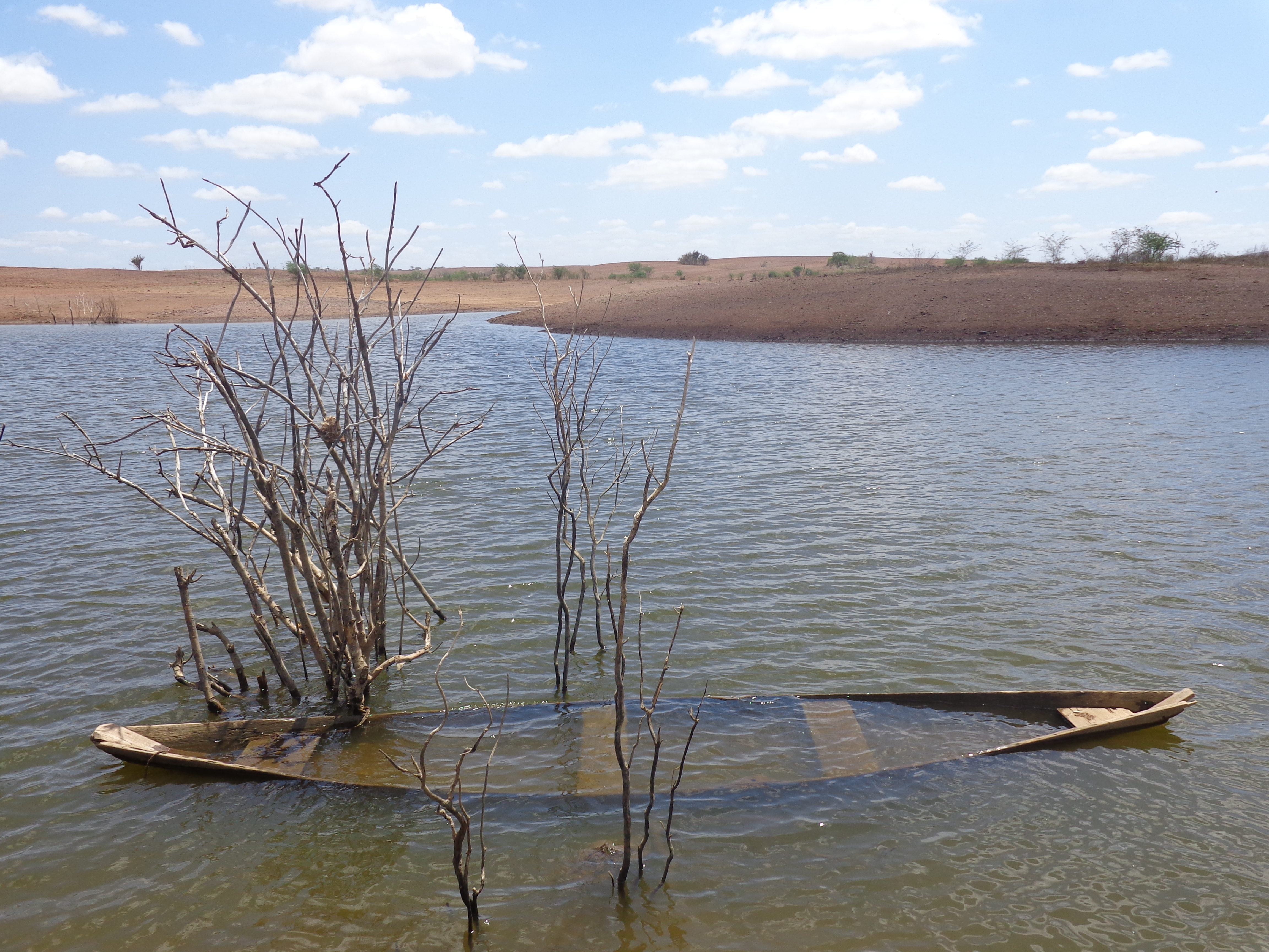 Há esperança da água em meio a aridez do sertão